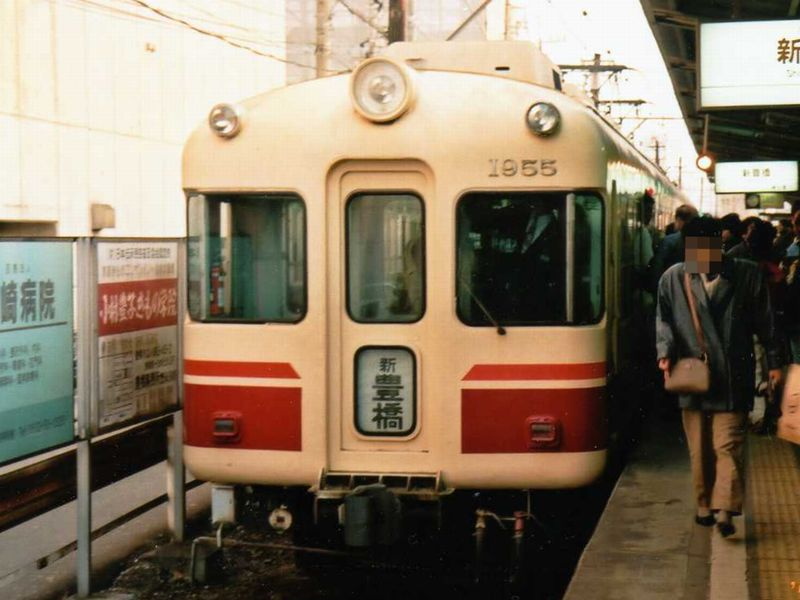 豊橋鉄道 1900形（車体は元名鉄5200系） 新豊橋駅にて